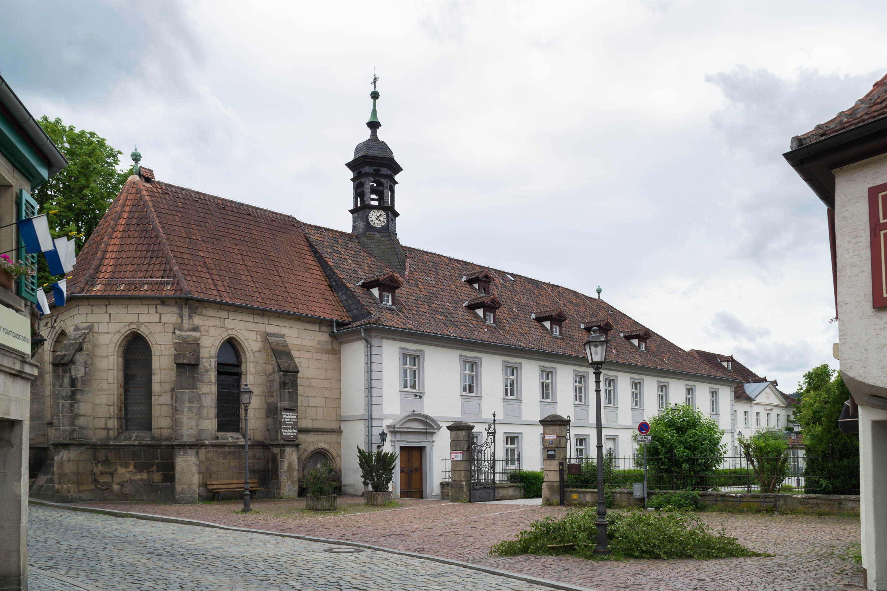 ehemaliges Bürgerspital mit Spitalkirche St. Anna in Kronach